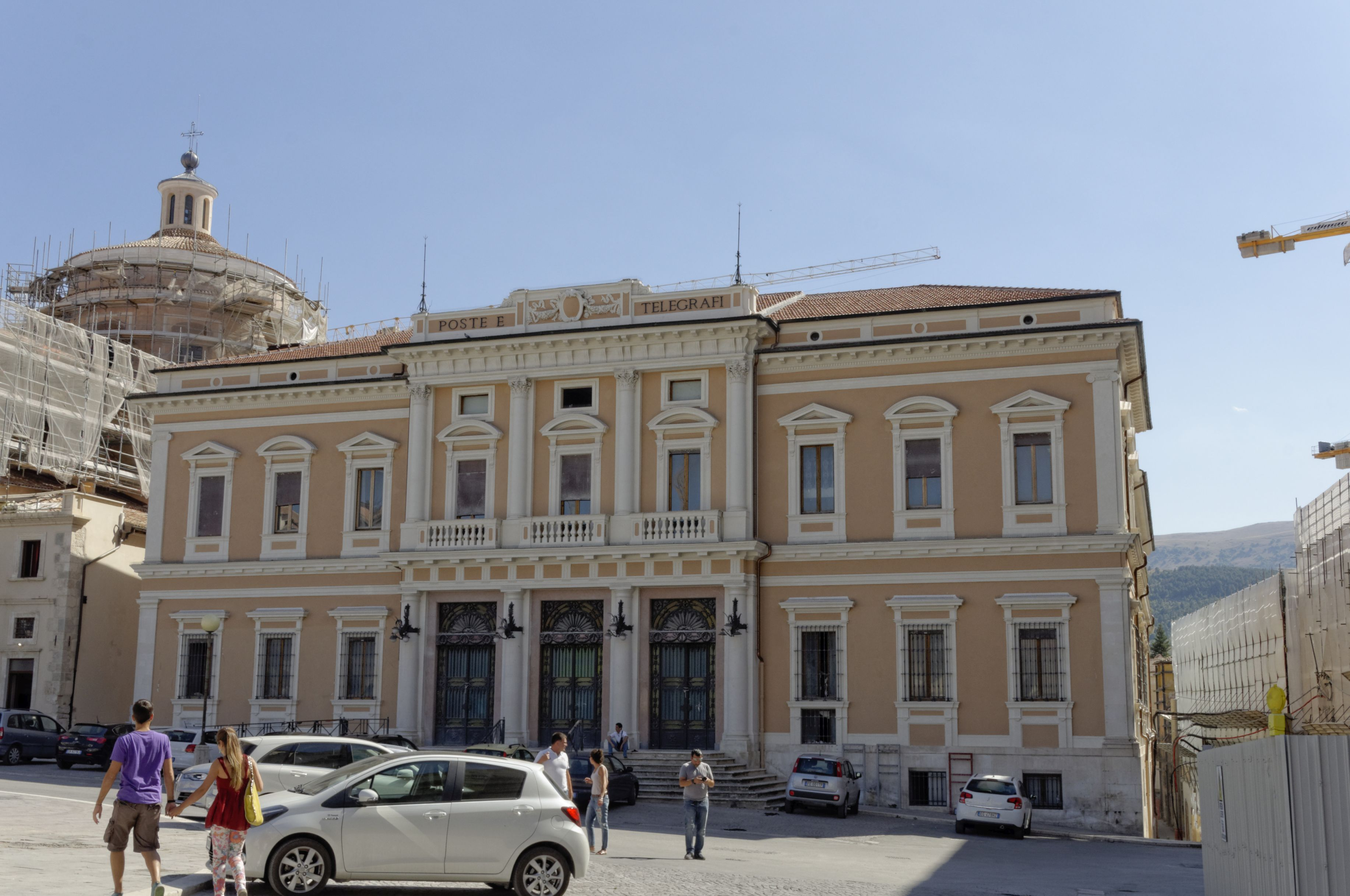 L'Aquila 2017 Dieses Foto entstand in Zusammenarbeit mit Stadtbesichtigungen.de Die Seiten Stadtbesichtigungen.de, der dazugehörige Reise Blog sowie die Facebookseite: Stadtbesichtigungen Rom dürfen dieses Bild für Ihre Veröffentlichungen ohne den Hinweis auf Wikipedia, Commons bzw der Lizenz verwenden. Die Verantwortlichen habe von mir (Ra Boe) die Originaldaten zur freien Verfügung übermittelt bekommen.